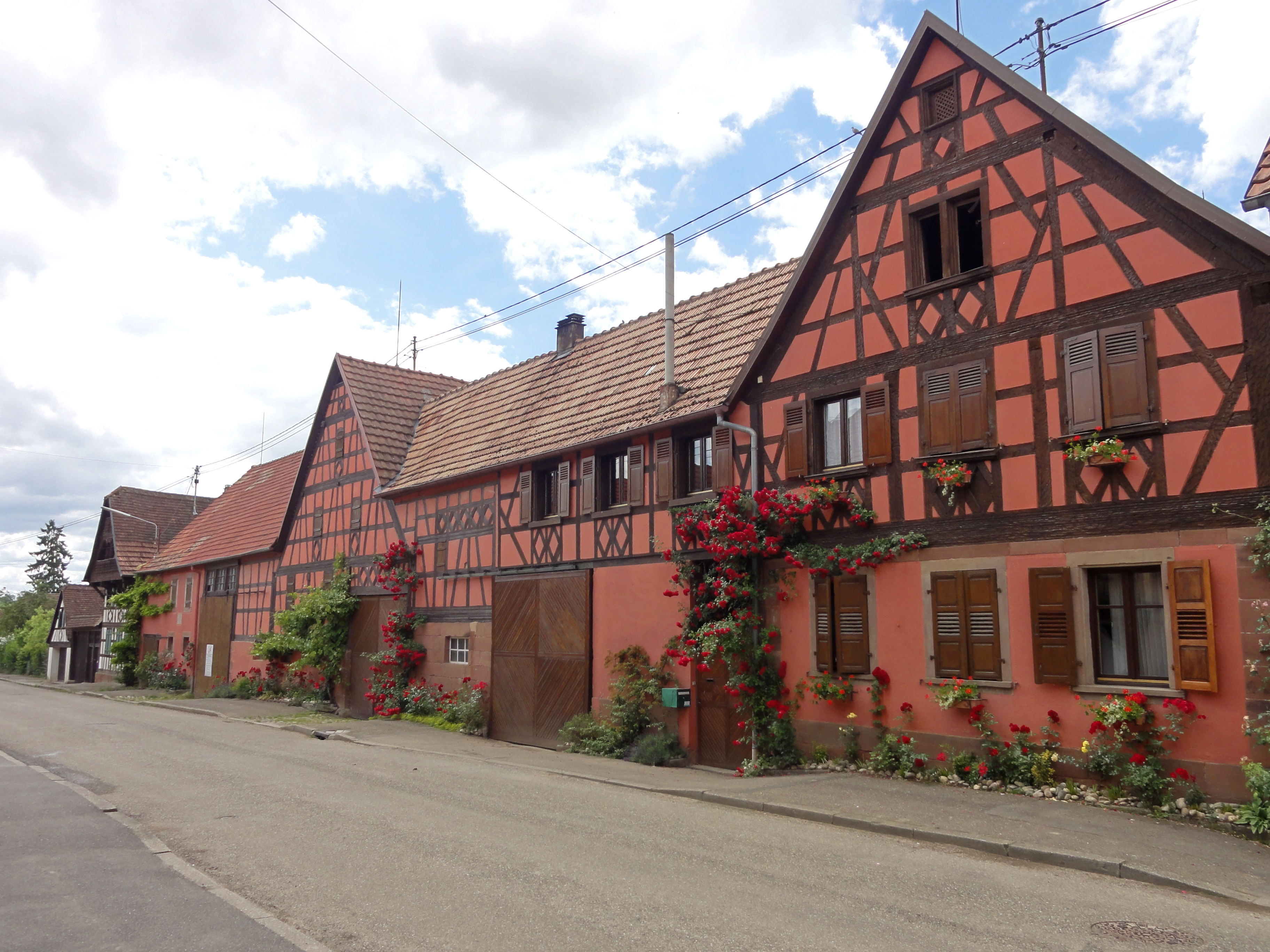 Alsace, Bas-Rhin, Issenhausen, Ferme (XVIIIe au XXe), 16 rue Principale. .